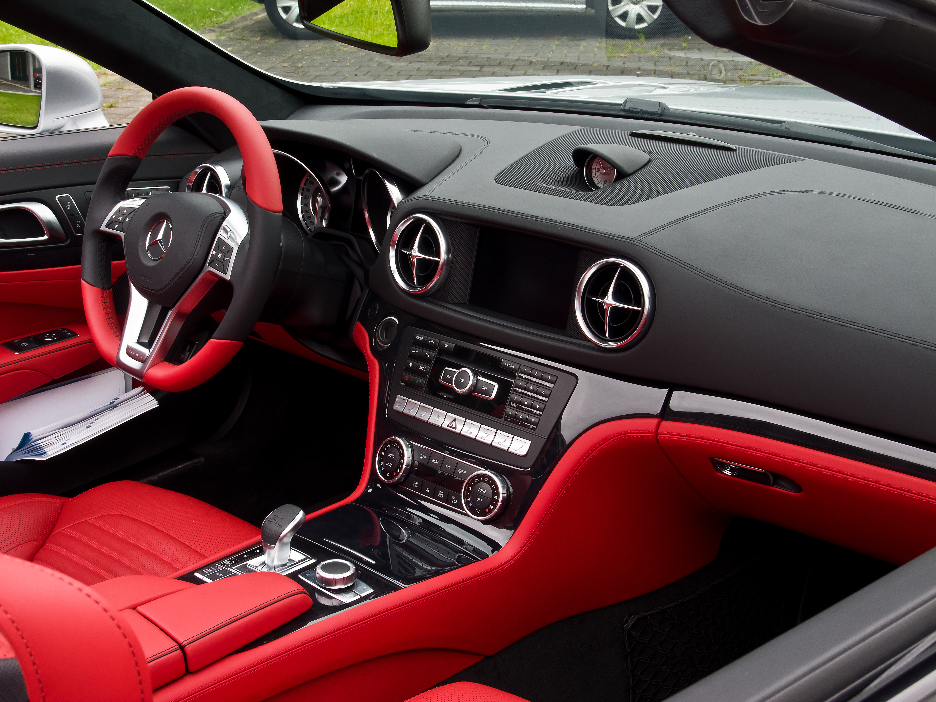 Mercedes-Benz SL 350 (R 231)